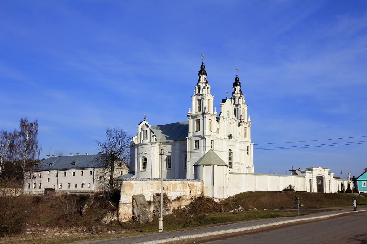 Івянец. Касцёл Св. Міхала Арханёла